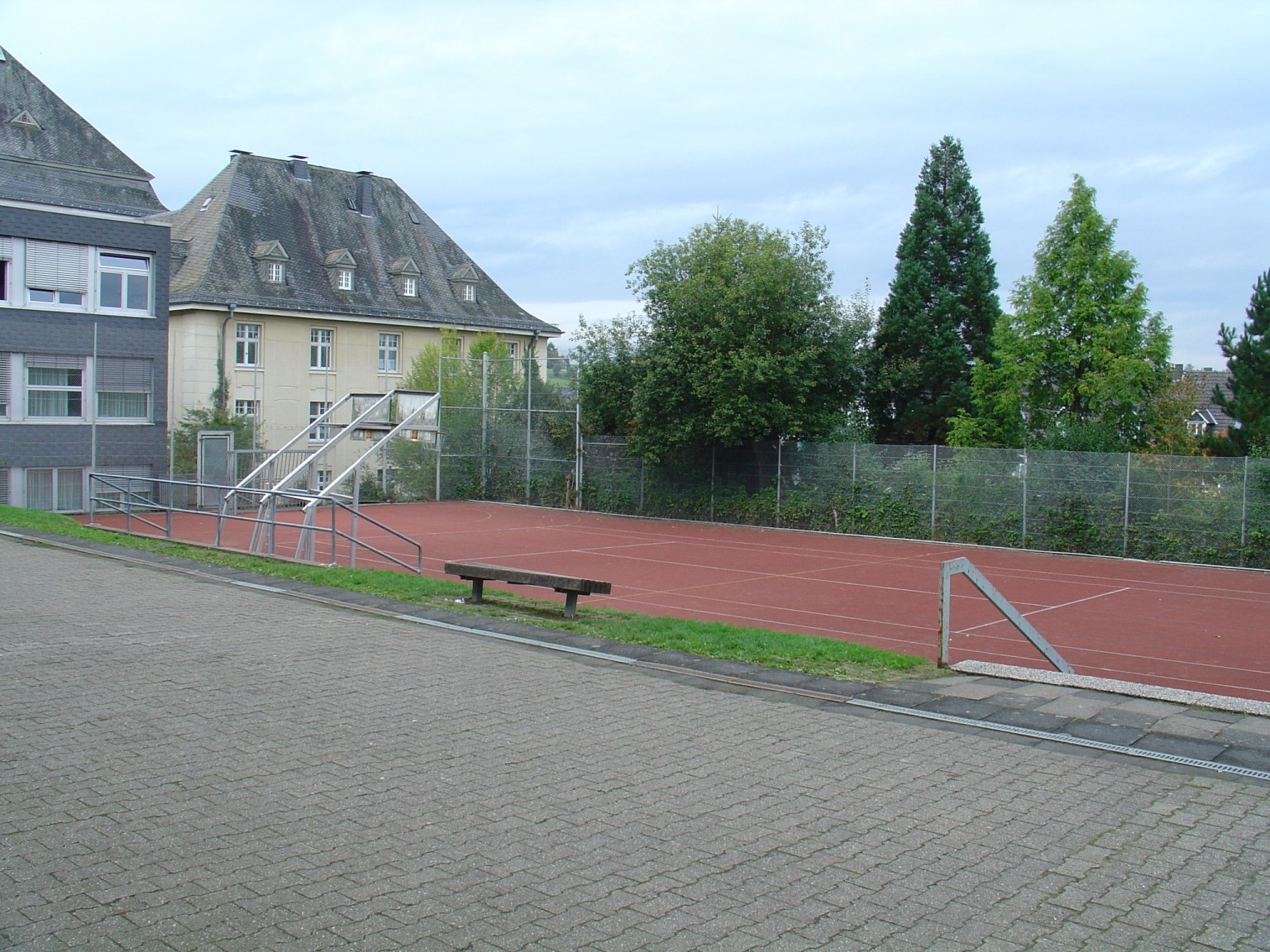 Beschreibung: Kleinspielfeld und ein Teil vom alten Schulgebäude des Engelbert von Berg Gymnasium in Wipperfürth Fotograf: Trexer Aufgenommen: 2004 mit Sony Cyber-shot DSC-V1